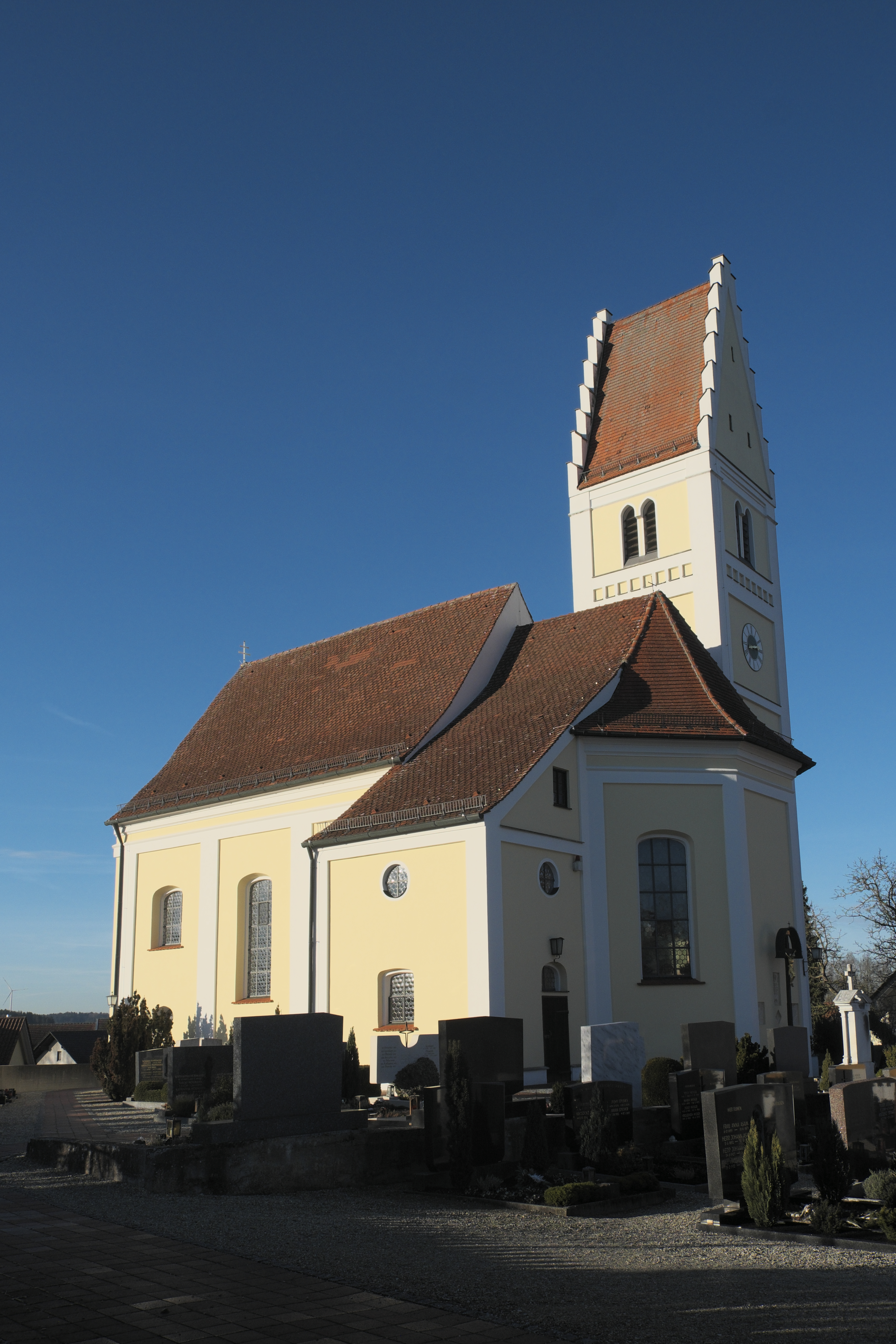 Katholische Pfarrkirche St. Katharina in Tödtenried (Sielenbach) im schwäbischen Landkreis Aichach-Friedberg (Bayern/Deutschland), Turm mit Stufengiebel